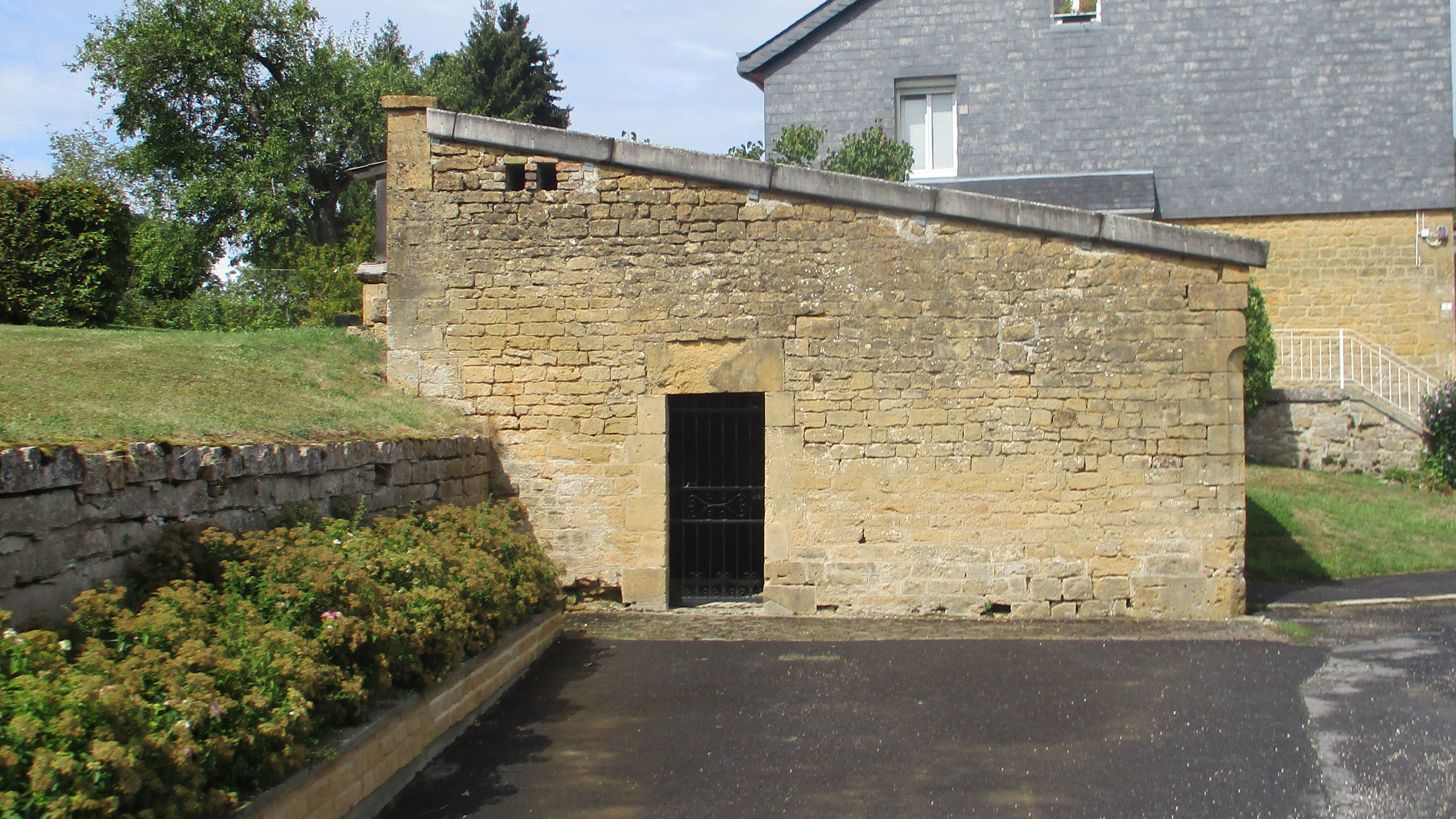 Oud Lavoir (wasplaats) in Hannogne-Saint-Martin (Ardennes)